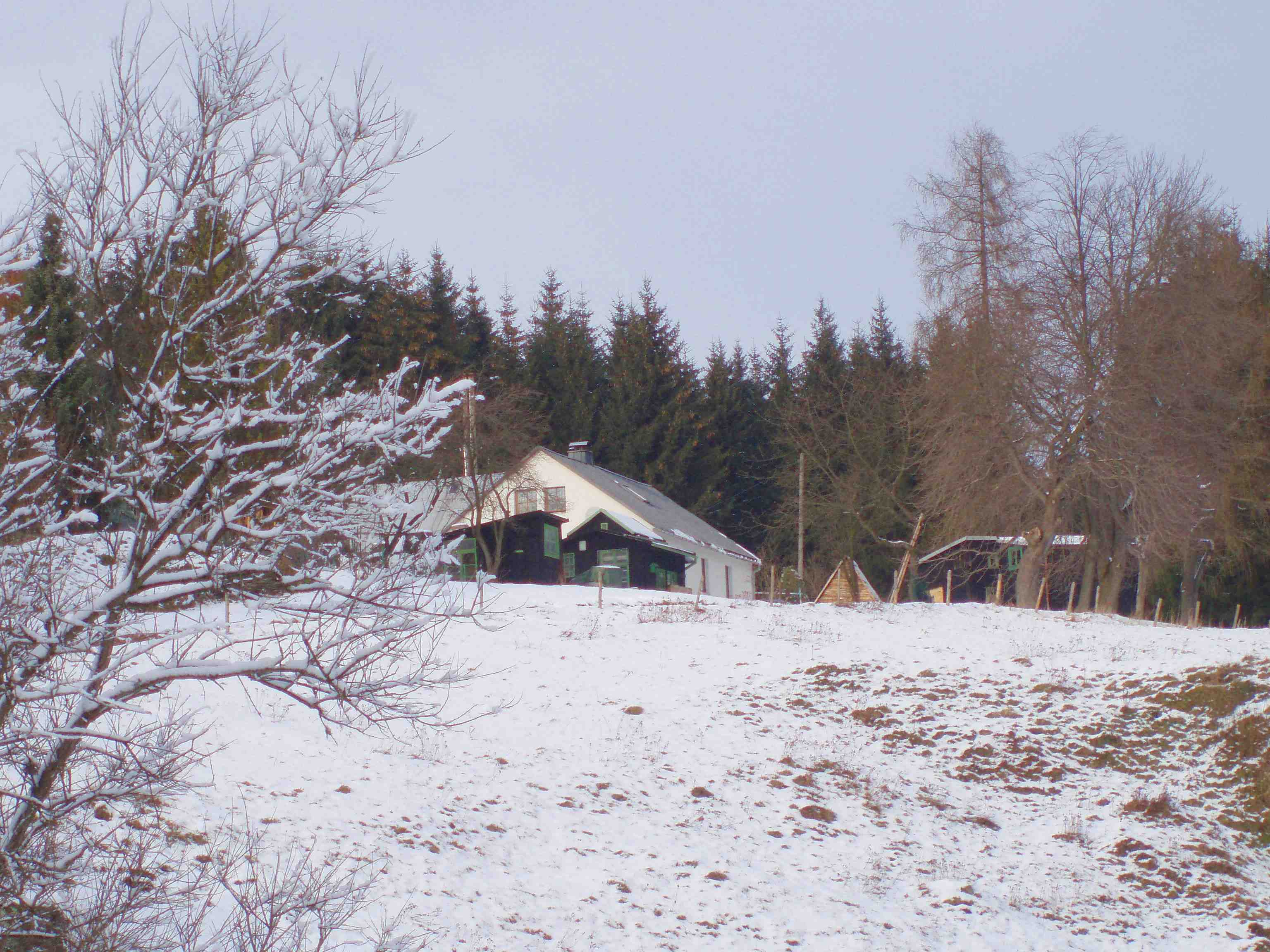 Huthaus Gabe Gottes